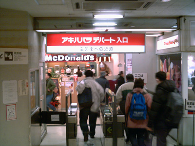 akihabara-Department store akihabara City Japan